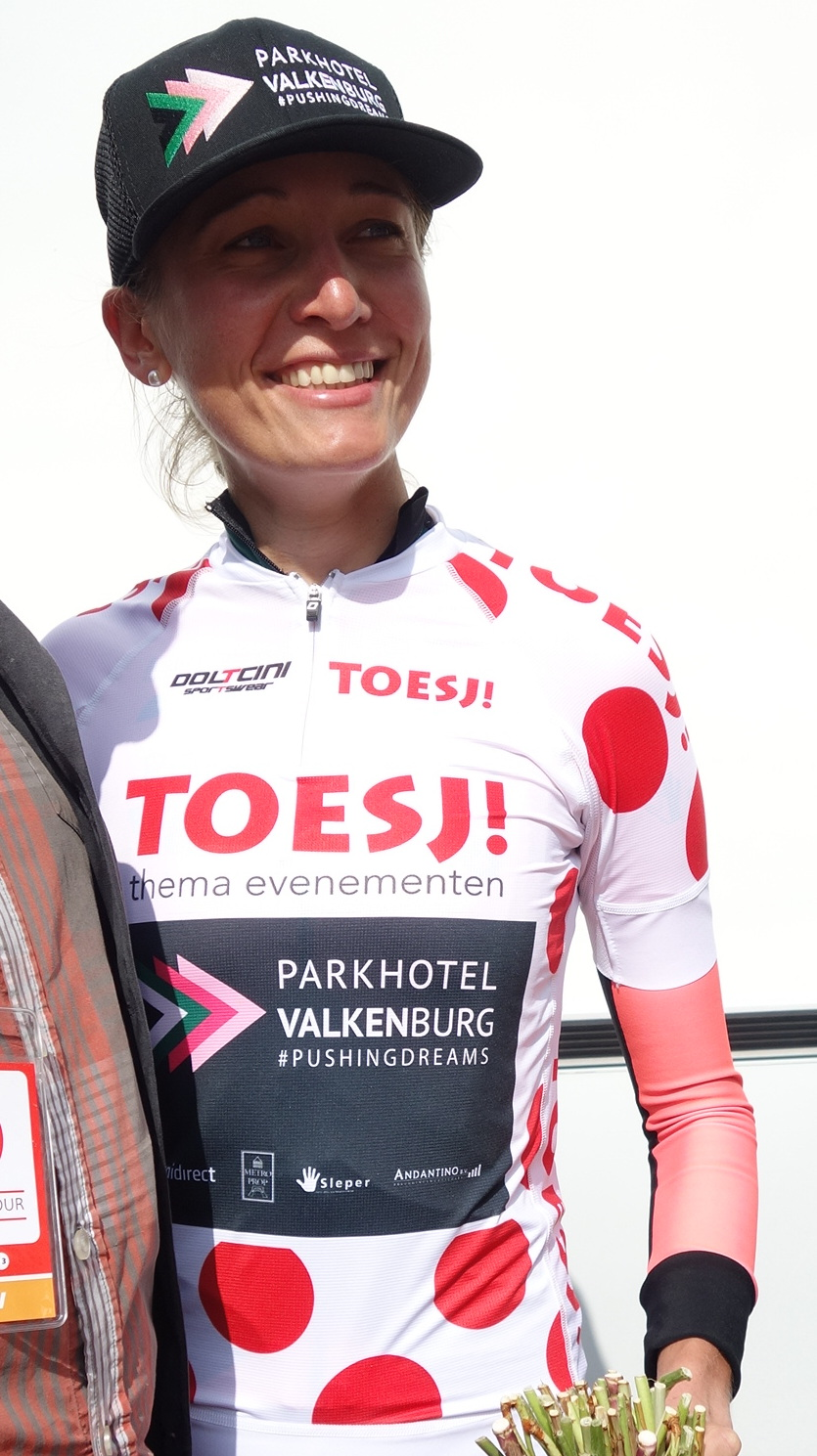 Na de laatste etappe in Geraardsbergen van de Lotto Belgium Tour 2019